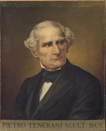 Portrait du sculpteur italien Pietro Tenerani (1789-1869) par Francesco Gaj (1835- 1907).